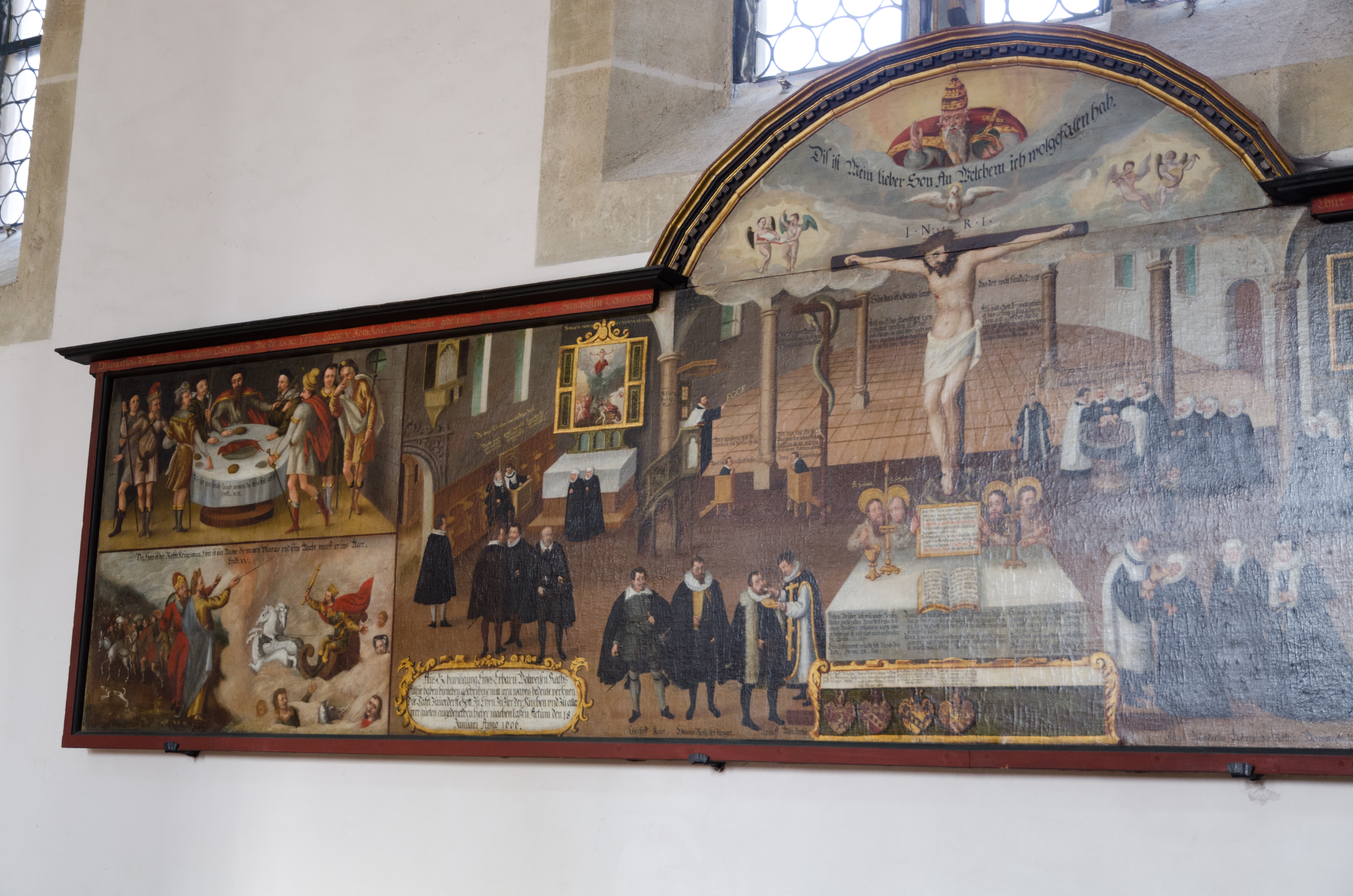 Evangelisch-Lutherische Stadtpfarrkirche St. Andreas in Weißenburg